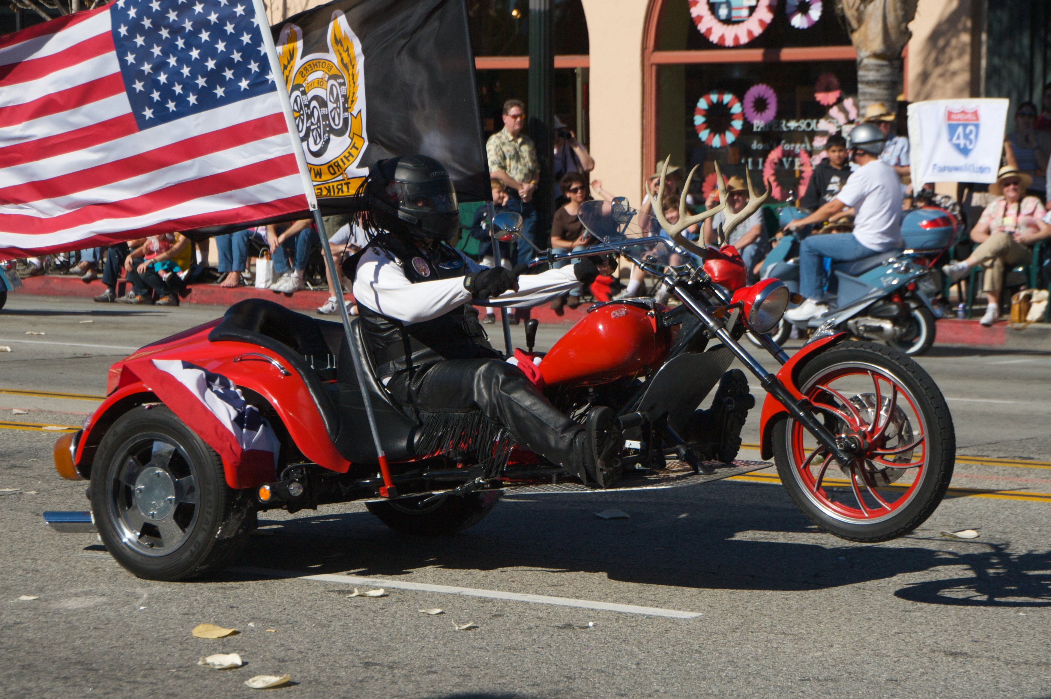 Wheelie, Doo Dah Parade - Pasadena CA - 2009